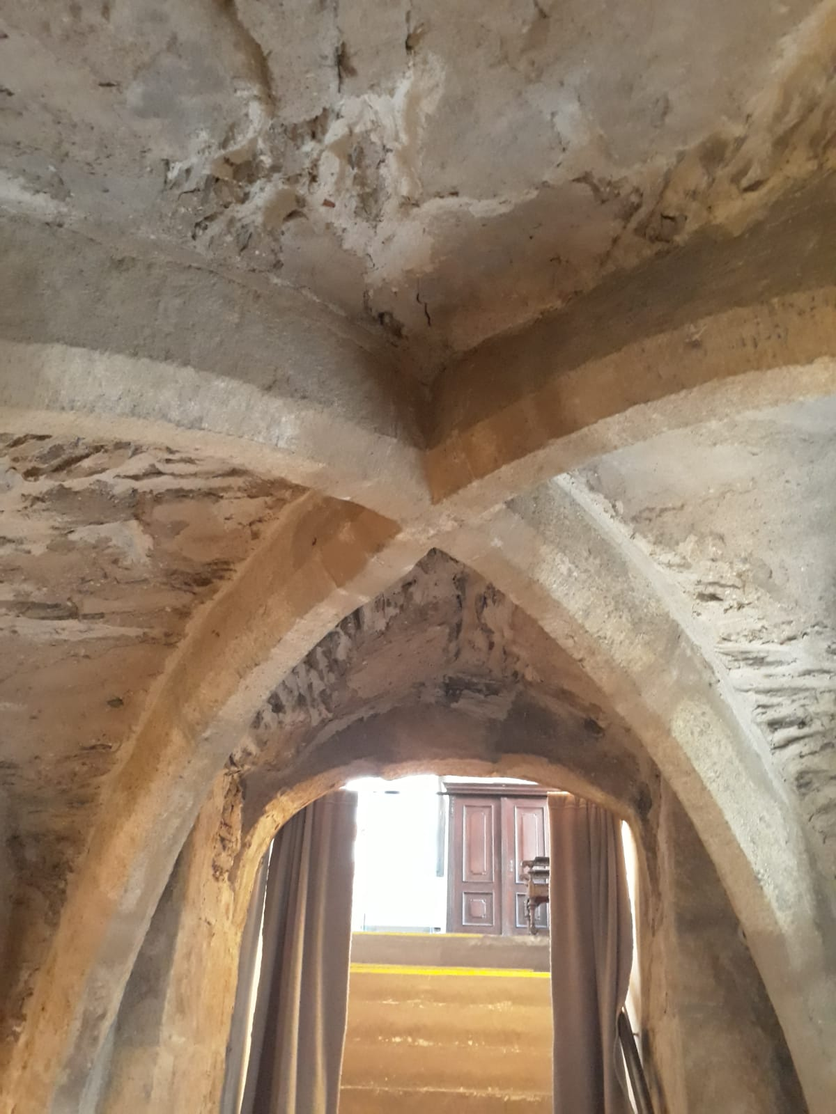 křížová klenba Kolín